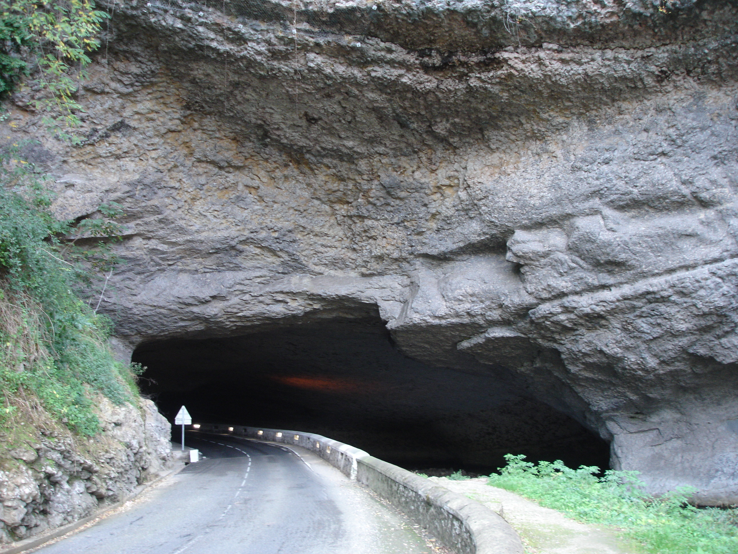 Entrée Nord de la Grotte du Mas d'Azil, Ariège (09), France